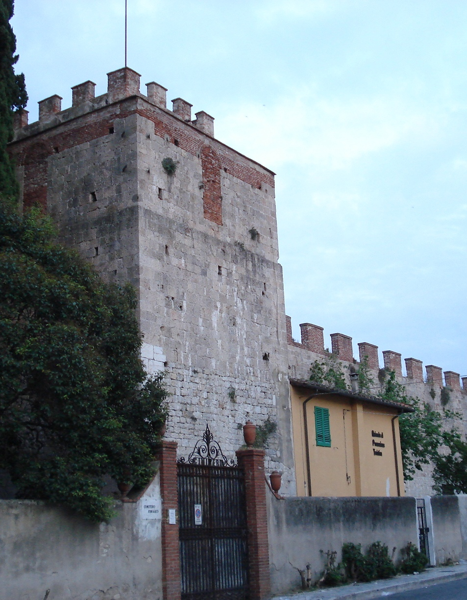 Torre del Catallo - esterno